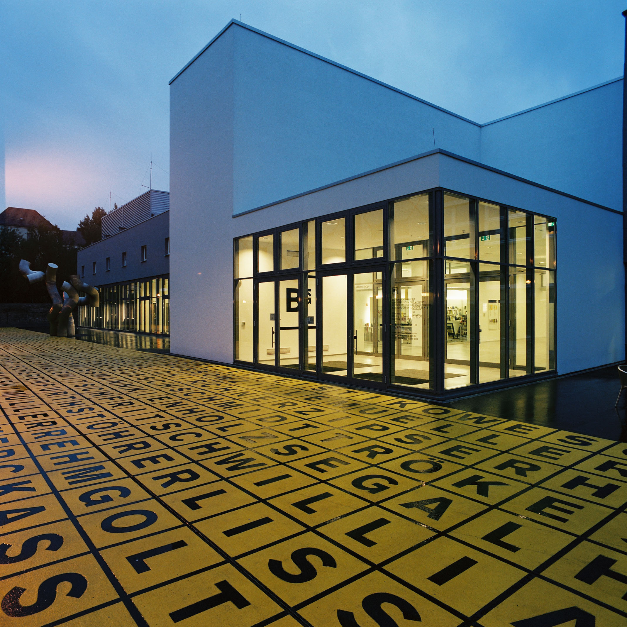 Außenansicht der Berlinischen Galerie (Landesmuseum für moderne Kunst), Berlin, Deutschland